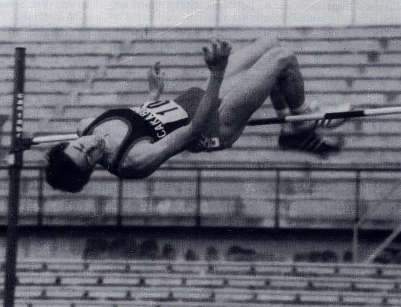 Marcello Benvenuti in azione in una gara iin Italia degli anni ottanta